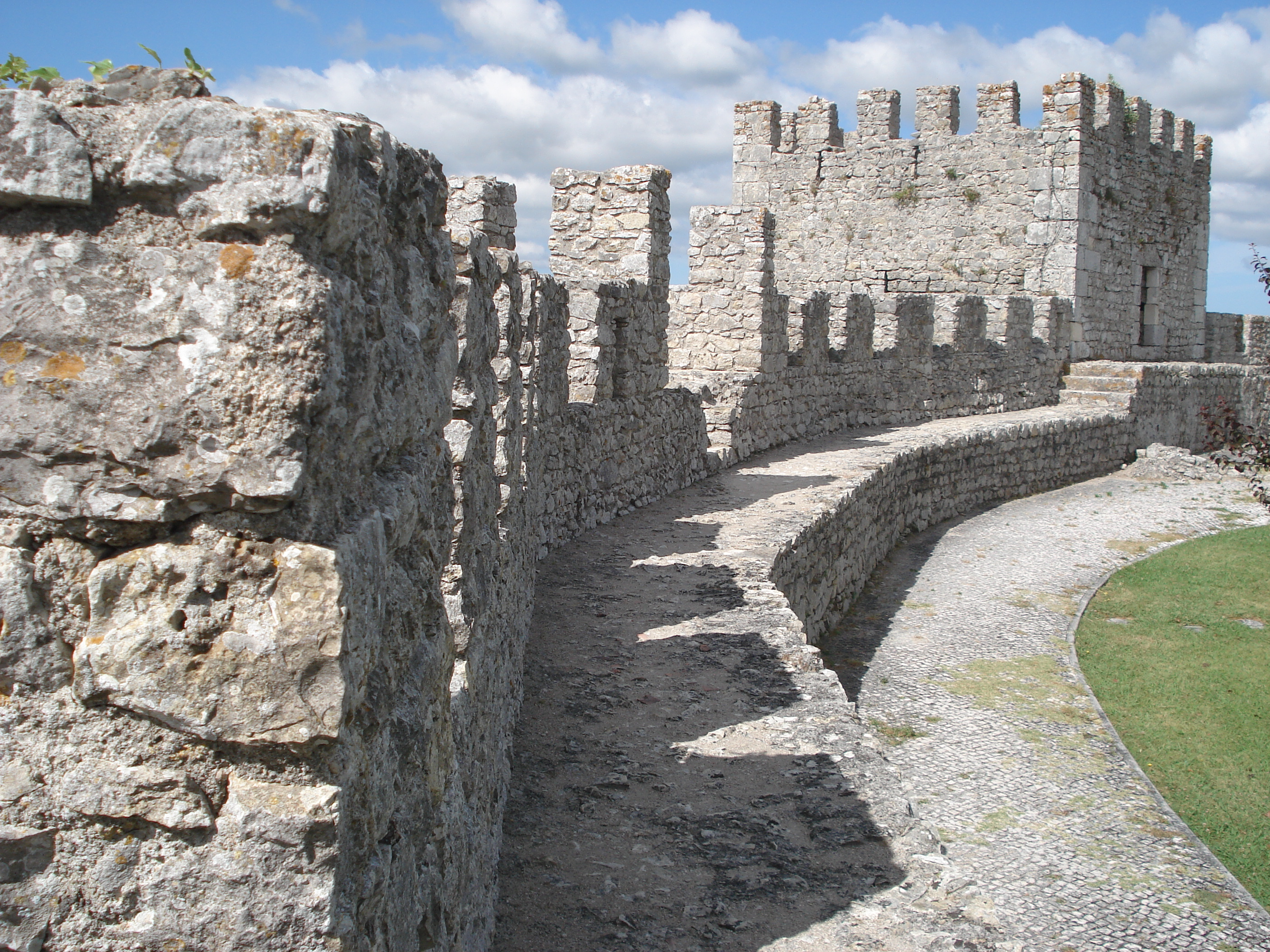 Muralha do Castelo de Montemor-o-velho vista de dentro.